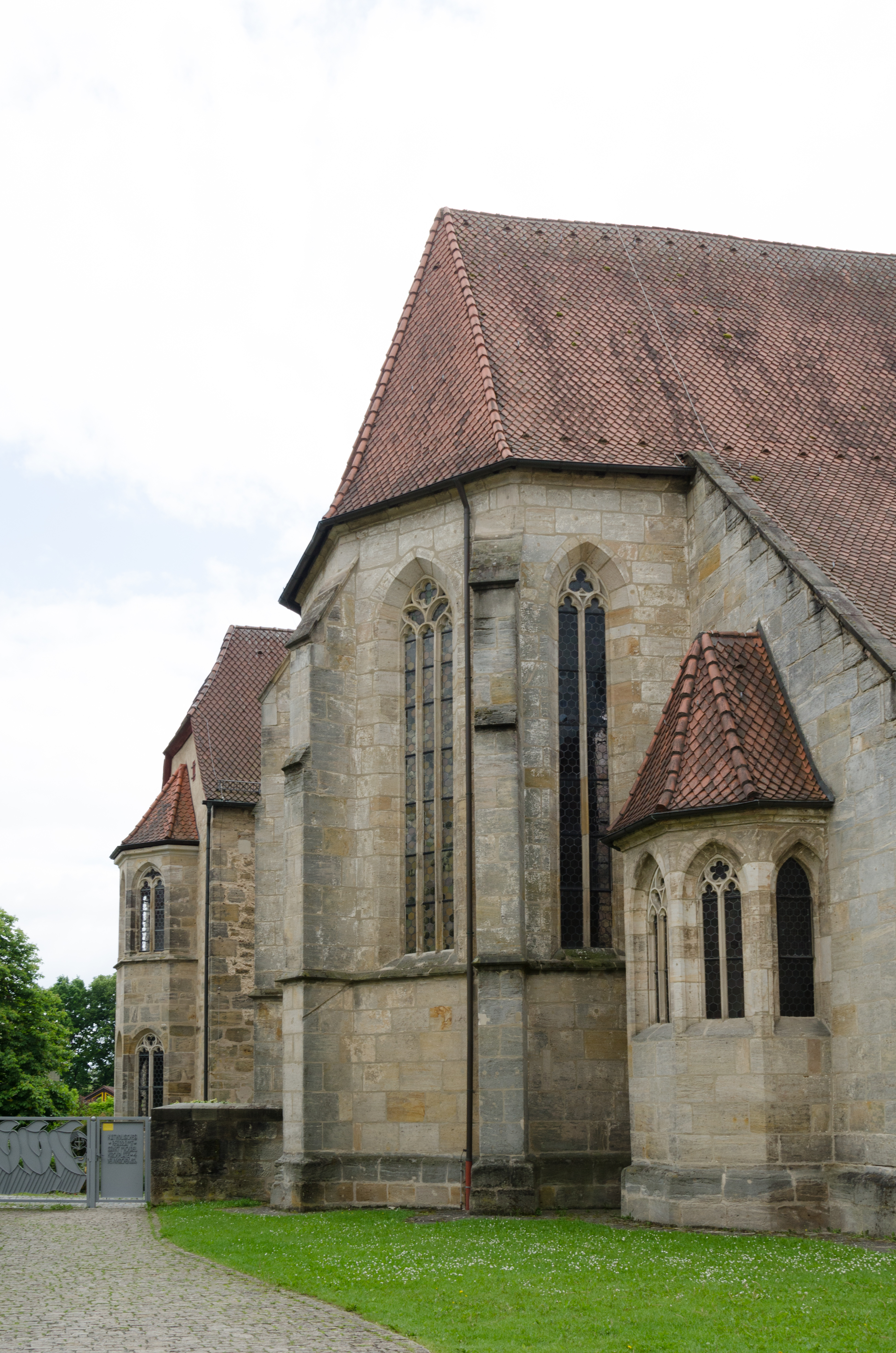 Neunkirchen am Brand, Pfarrkirche St. Michael